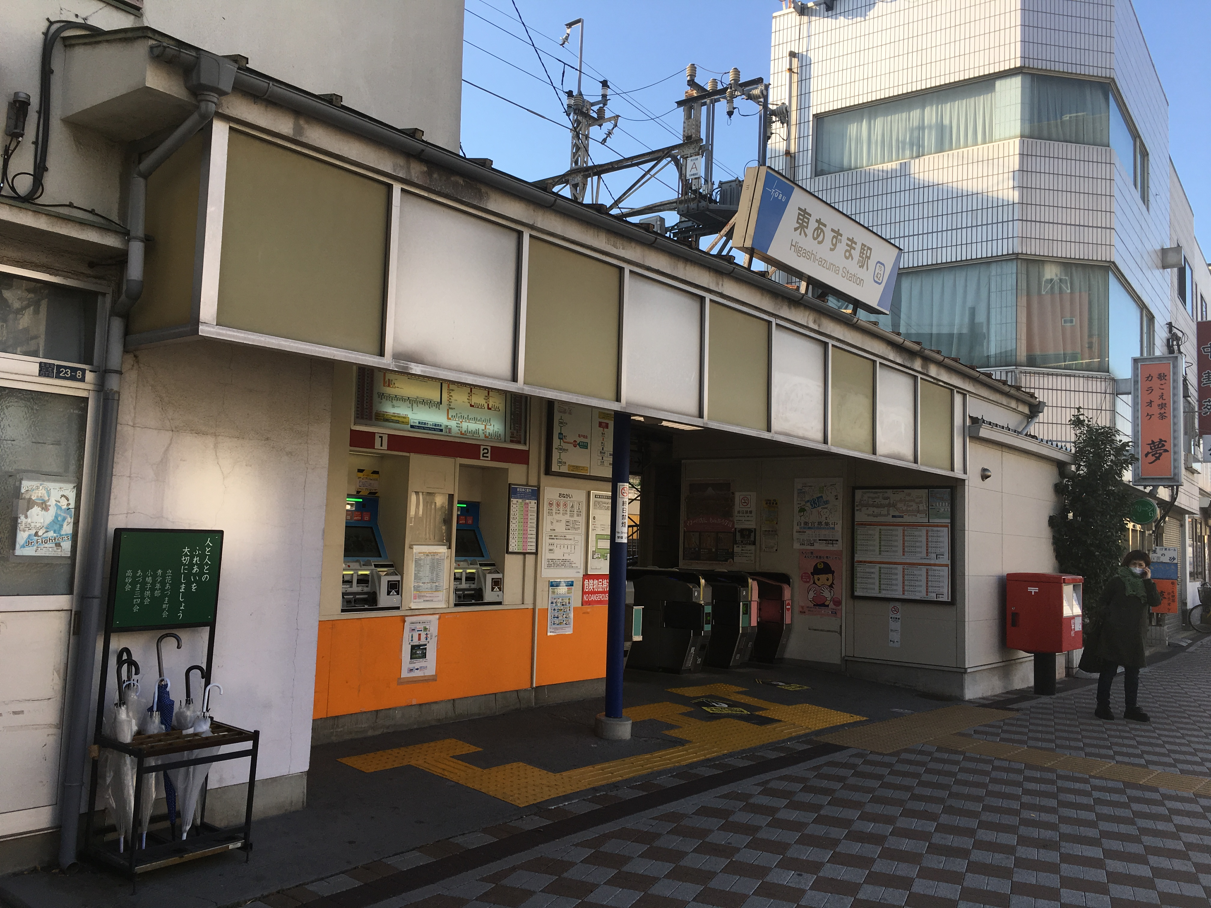 東あずま駅 (Higashi-Azuma Station)